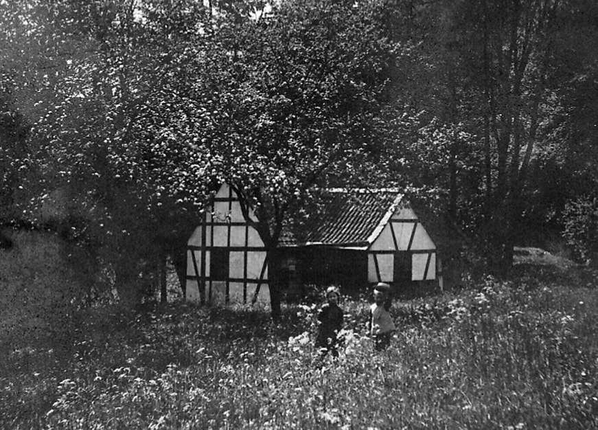 ehemaliges Trockenhaus bei Gut Schiff